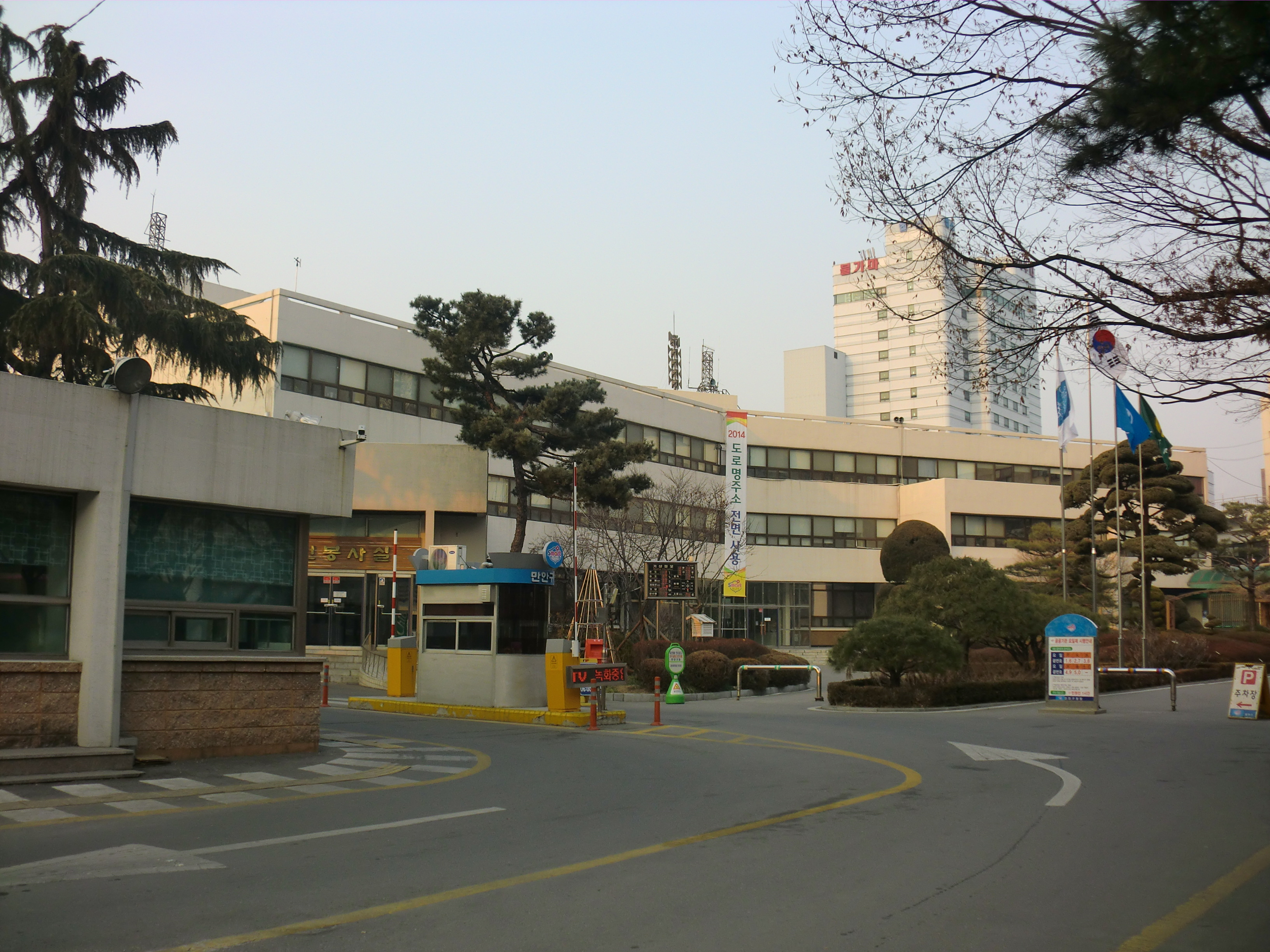 경기도 안양시 만안구에 있는 만안구청